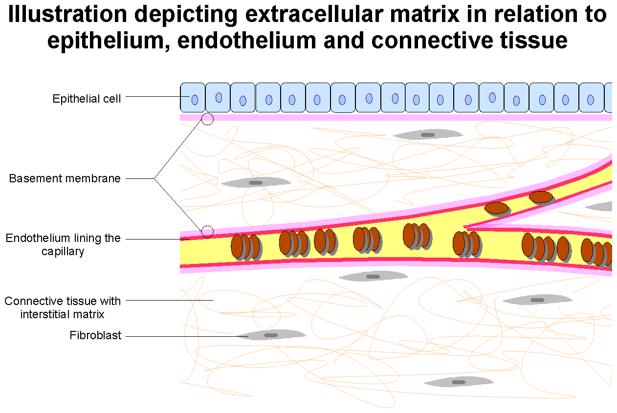 Schema de la Matrice Extracellulaire